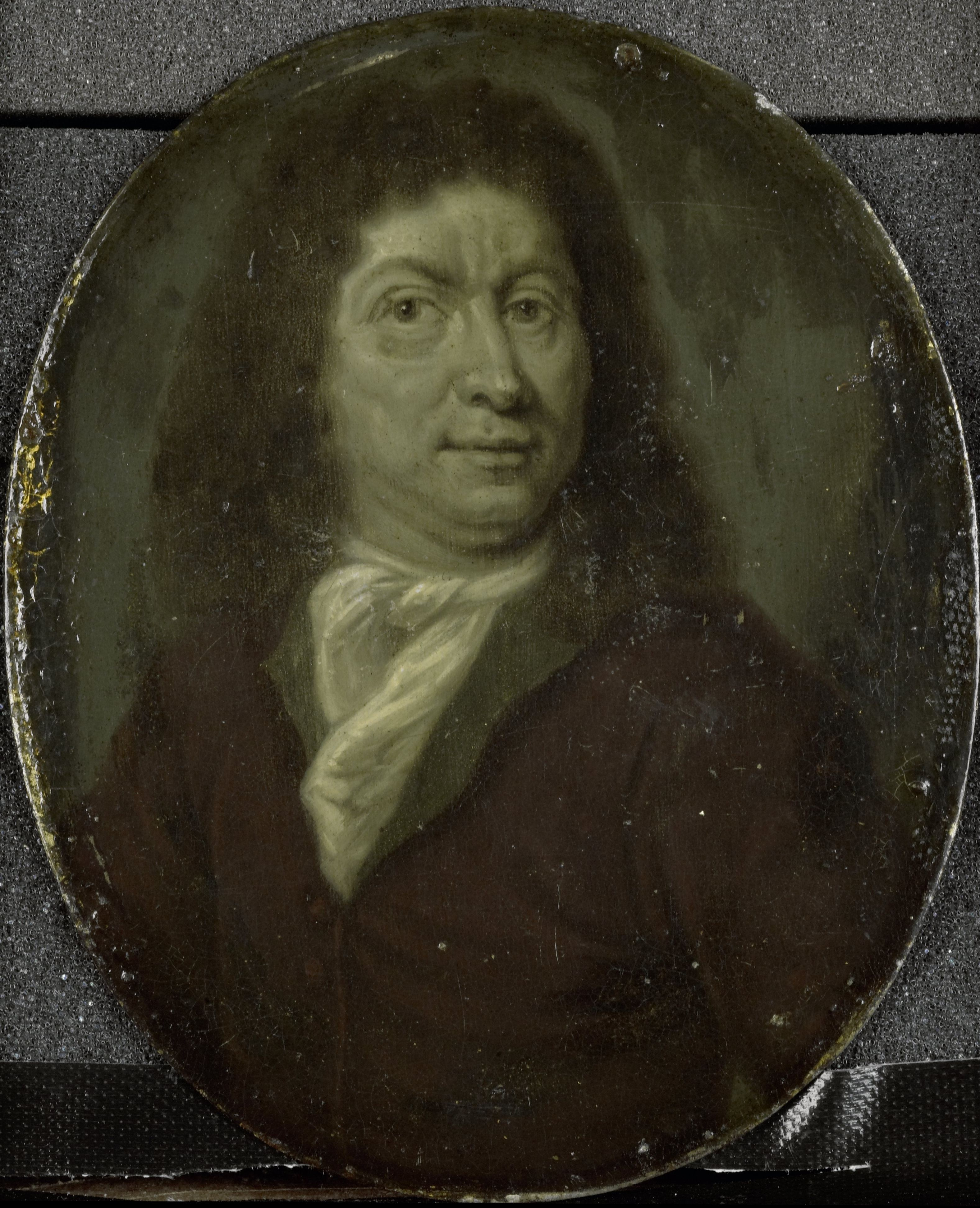 Portret van Andries Pels (1631-81). Toneeldichter te Amsterdam. Buste in ovaal, het hoofd naar rechts gekeerd. Vervaardigd naar een onbekend voorbeeld. Onderdeel van een verzameling portretten van Nederlandse dichters. Collection: schilderijen; Panpoeticon Batavum